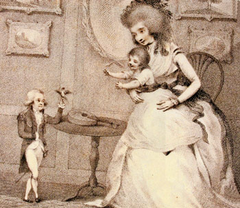 Joseph Boruwlaski Jozef Boruwlaski